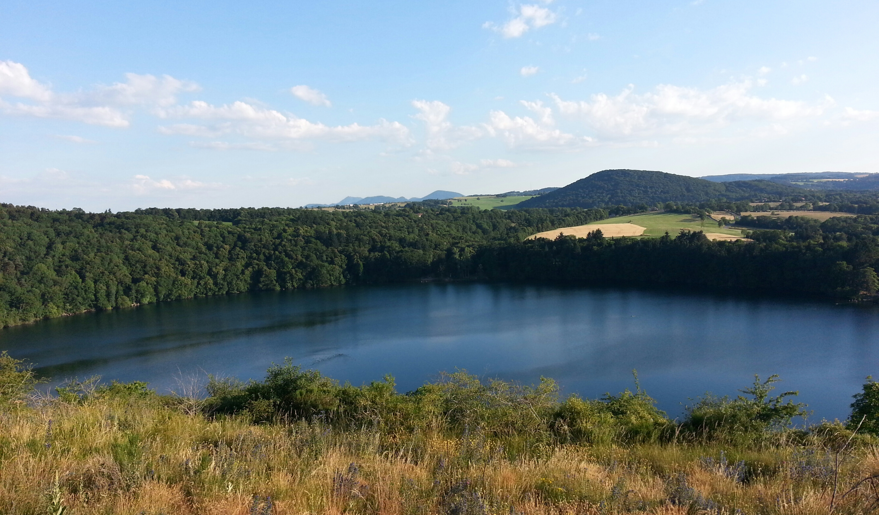 vue du Gour de Tazenat depuis le versant sud en juillet 2015